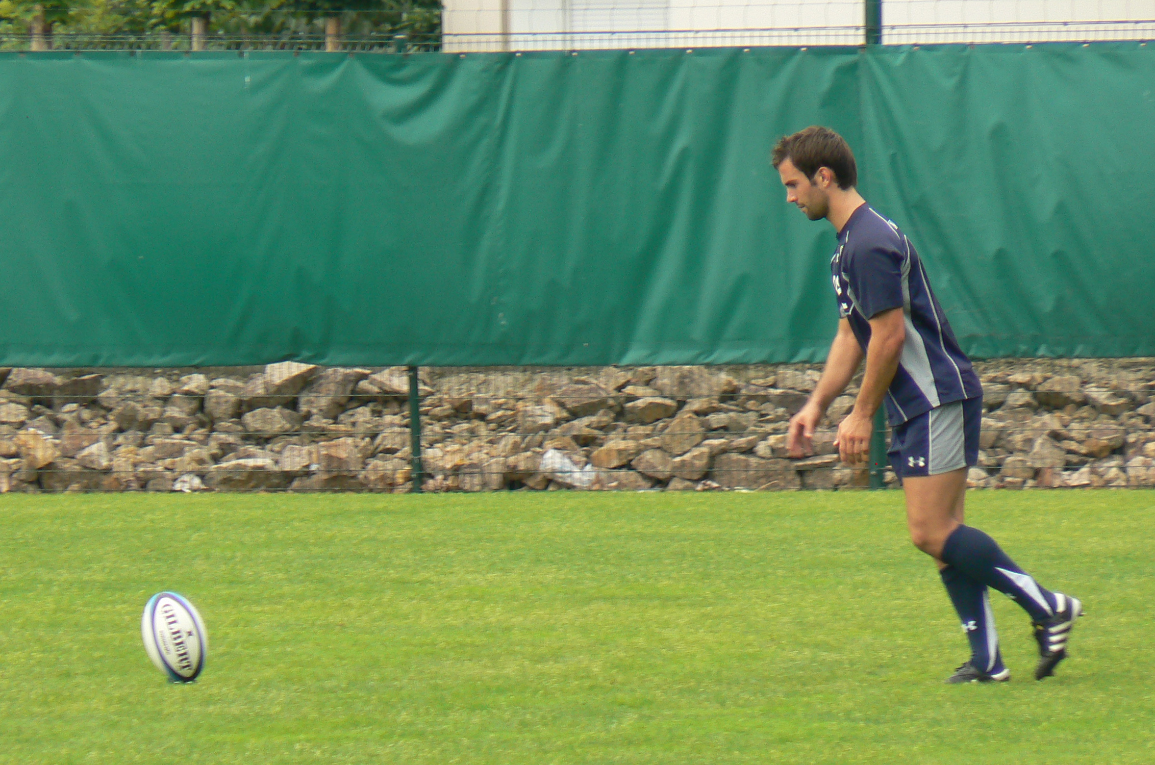 Le rugbyman international français Morgan Parra lors d'un entraînement avec l'ASM Clermont Auvergne